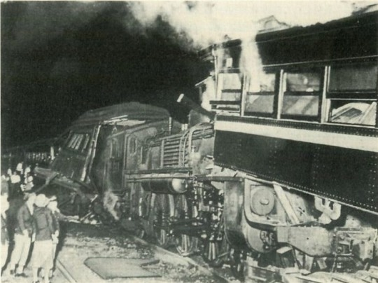 岡山駅での追突事故。